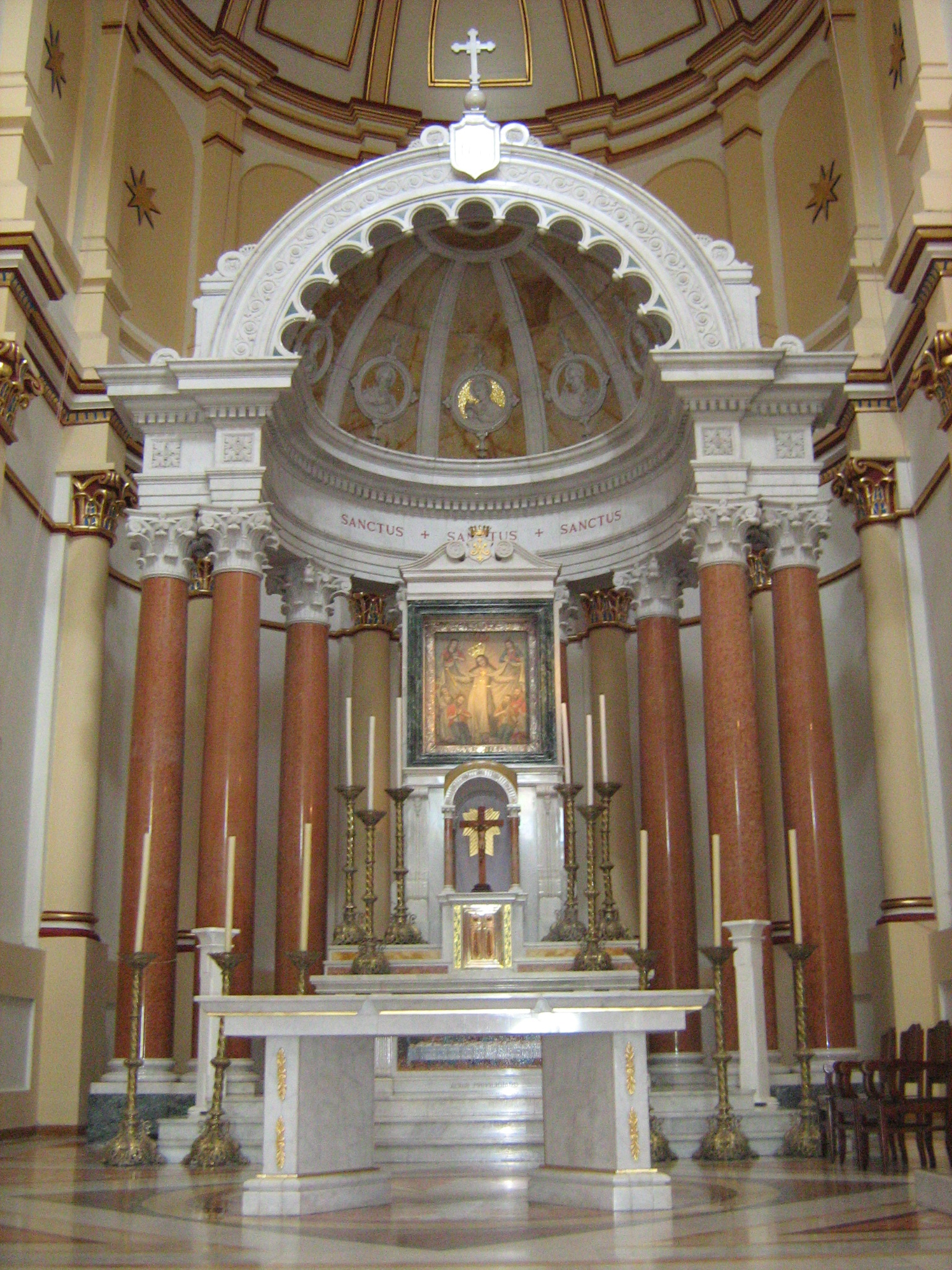 Altar de mármol de la Basílica de Yarumal, Antioquia, Colombia.